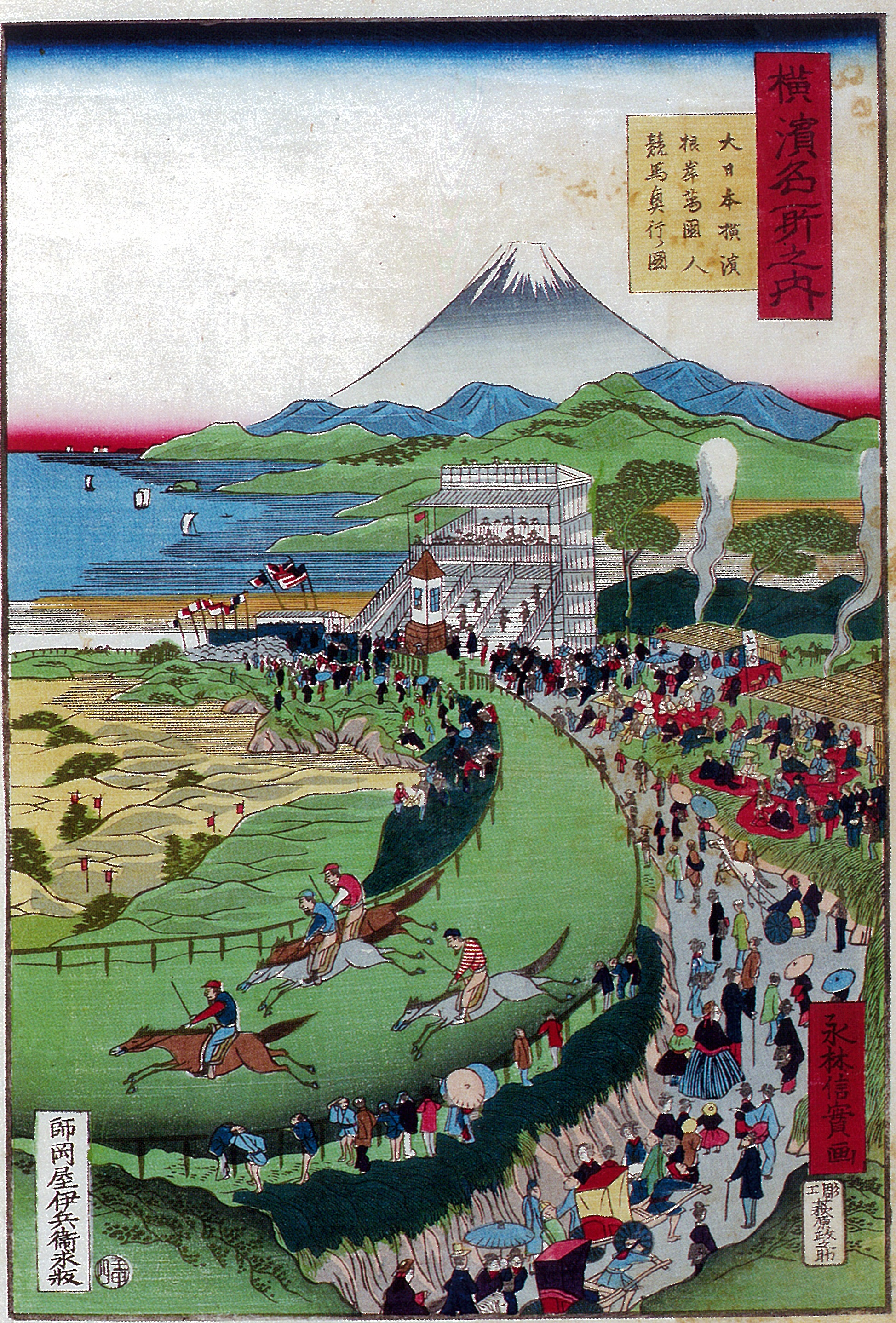 一港斎 永林（いっこうさい えいりん） 本名？永林信実 作 「横浜名所之内 大日本横浜根岸万国人競馬興行ノ図」 1872年(明治5年)